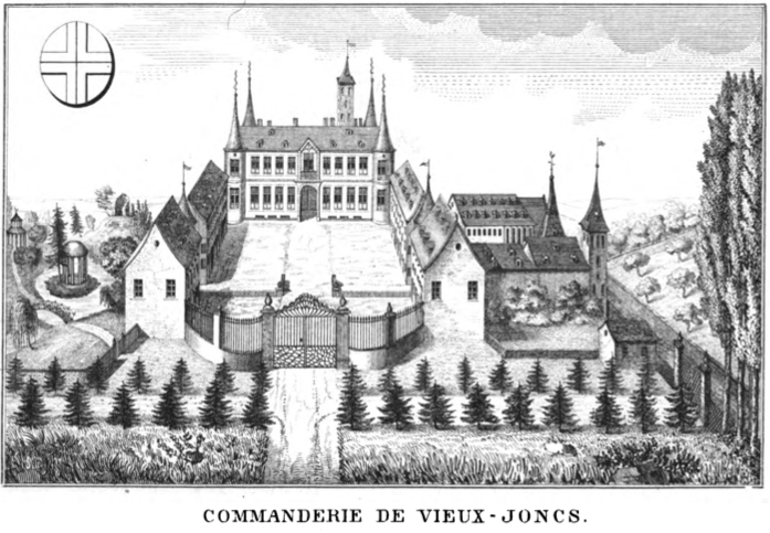 Commanderie des vieux-Joncs à Oude Biesen